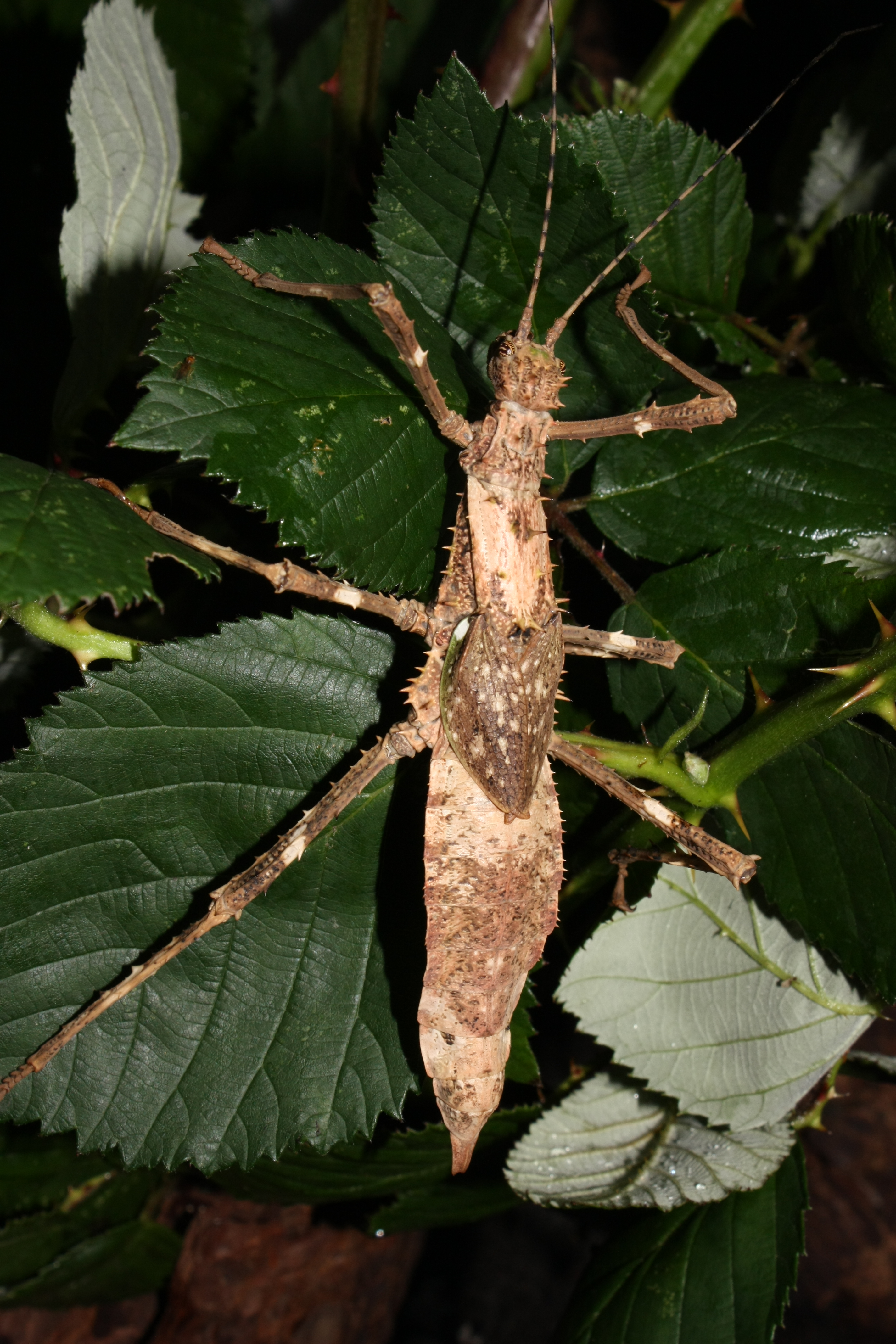 female of Haaniella erringtoniae